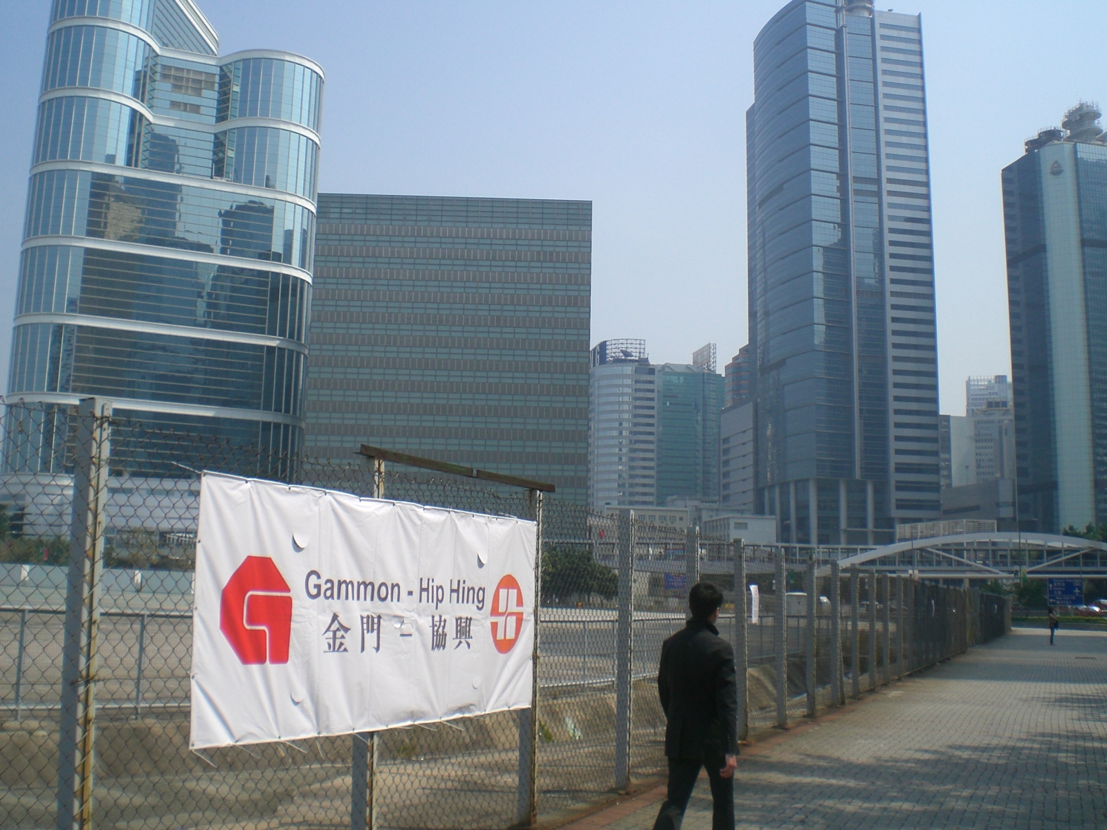 金門建築協興建築聯營（設計A）添馬艦發展工程